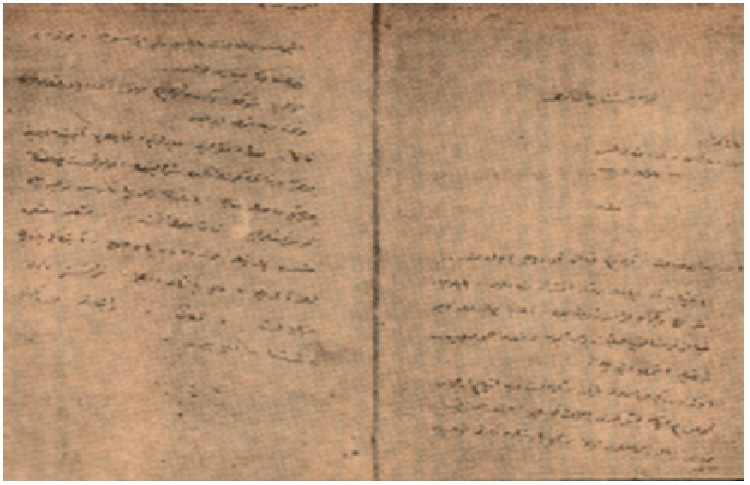 Komünist Manifesto'nun Mustafa Suphi tarafından başlanmış ama yarım kalmış Türkçeye çevirisinin ilk iki sayfası